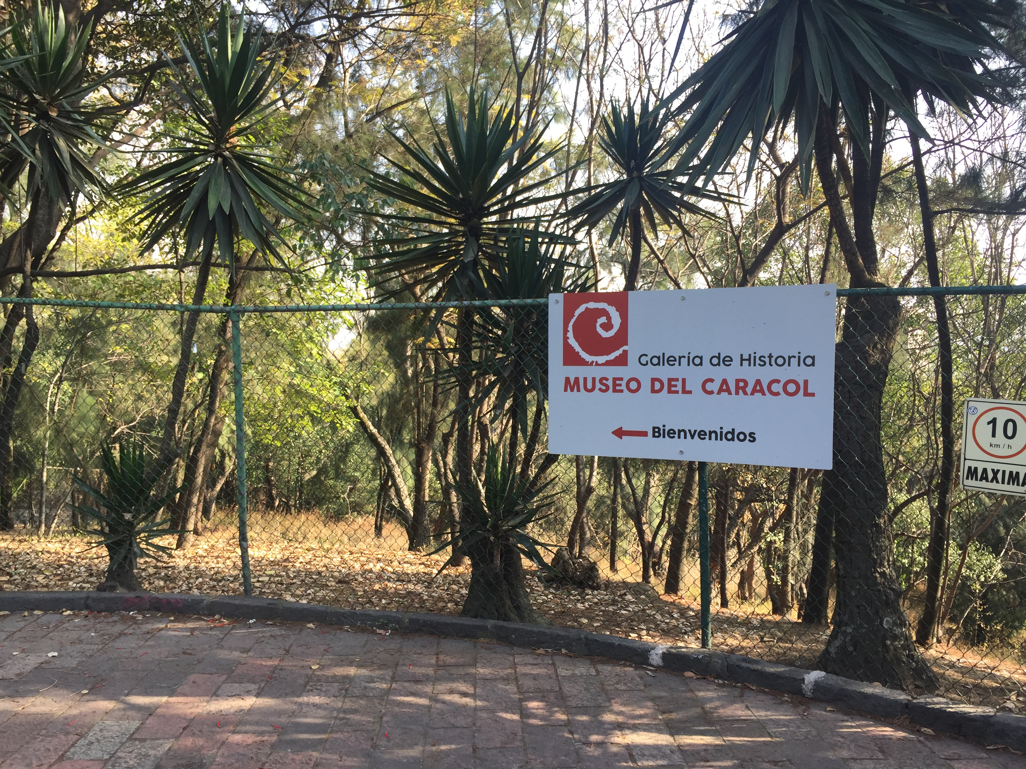 Señalización rumbo al museo